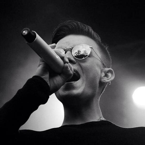 Nederlands musicalzanger